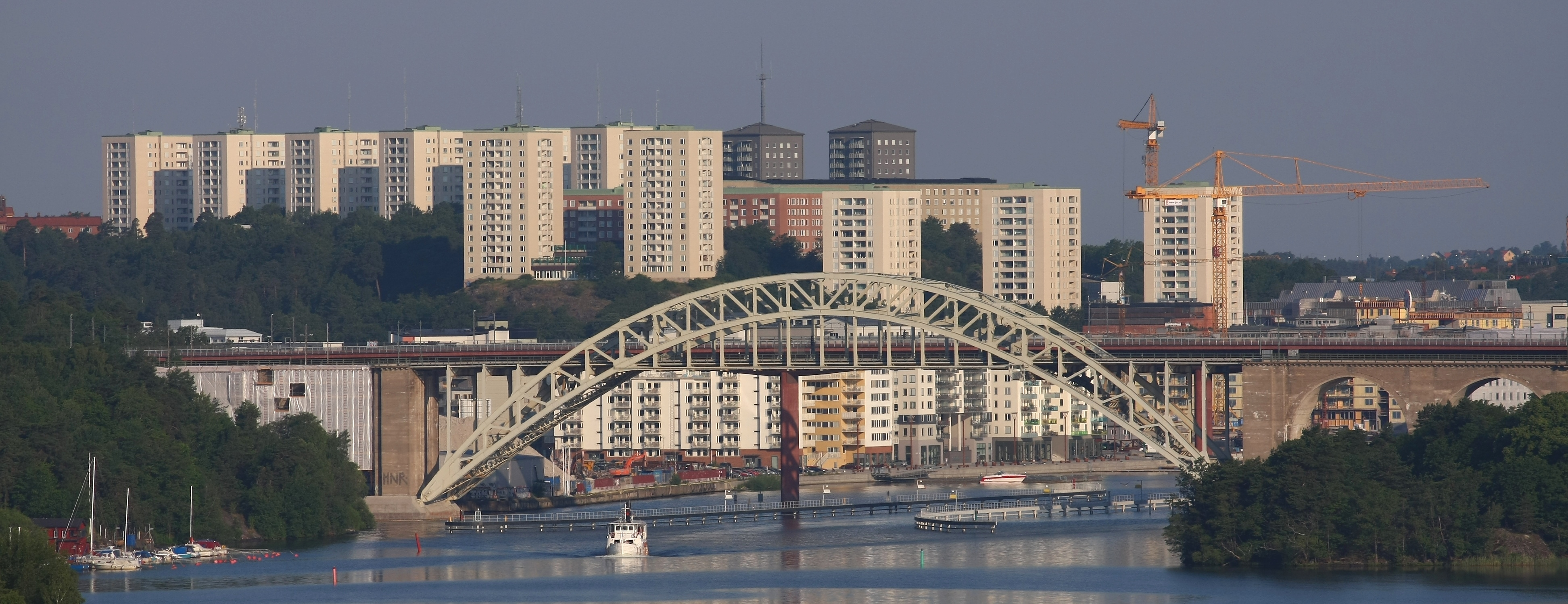 001 sec (1/1000) Aperture: f/5.6